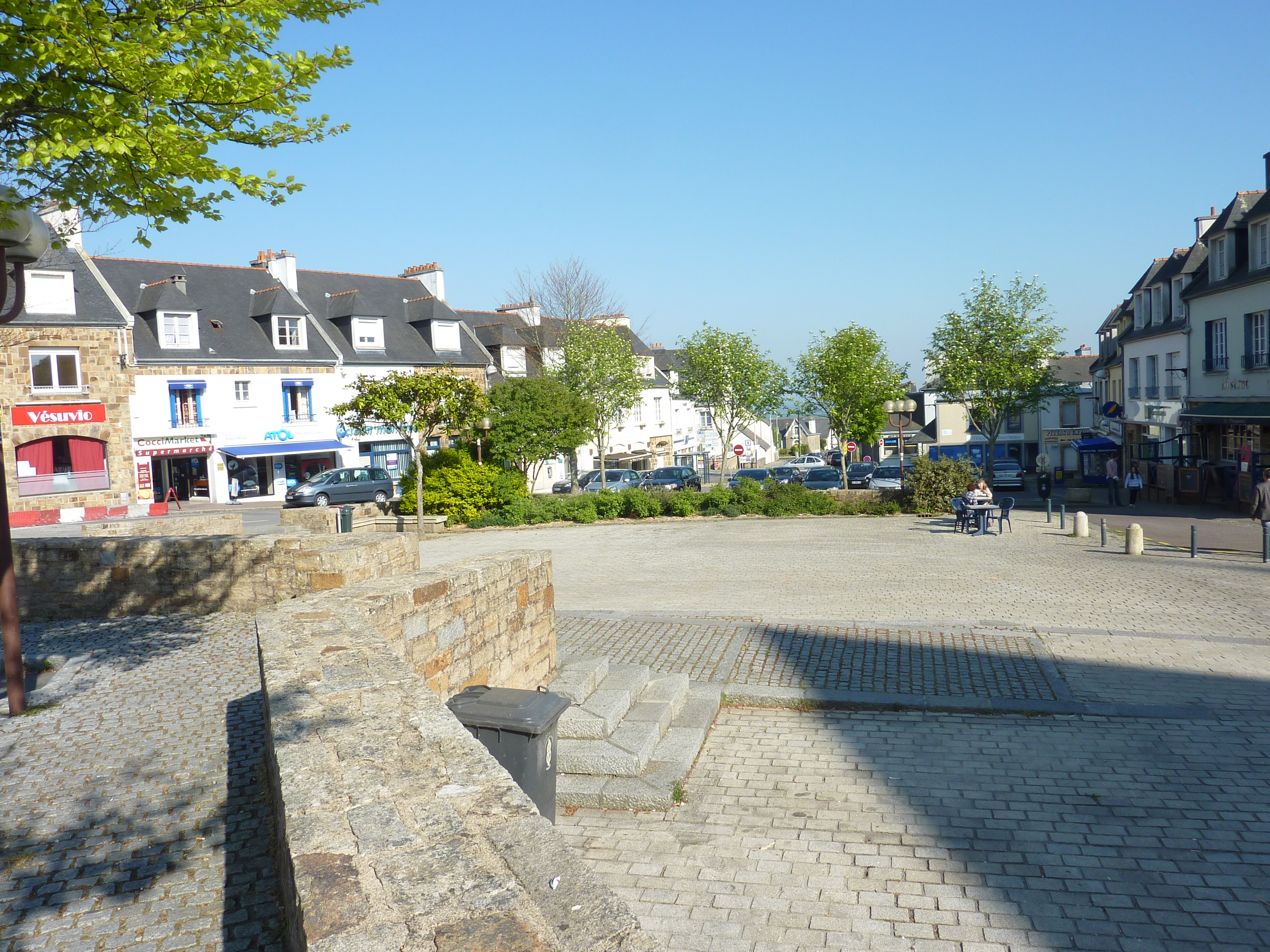 Plougastel-Daoulas : la place principale